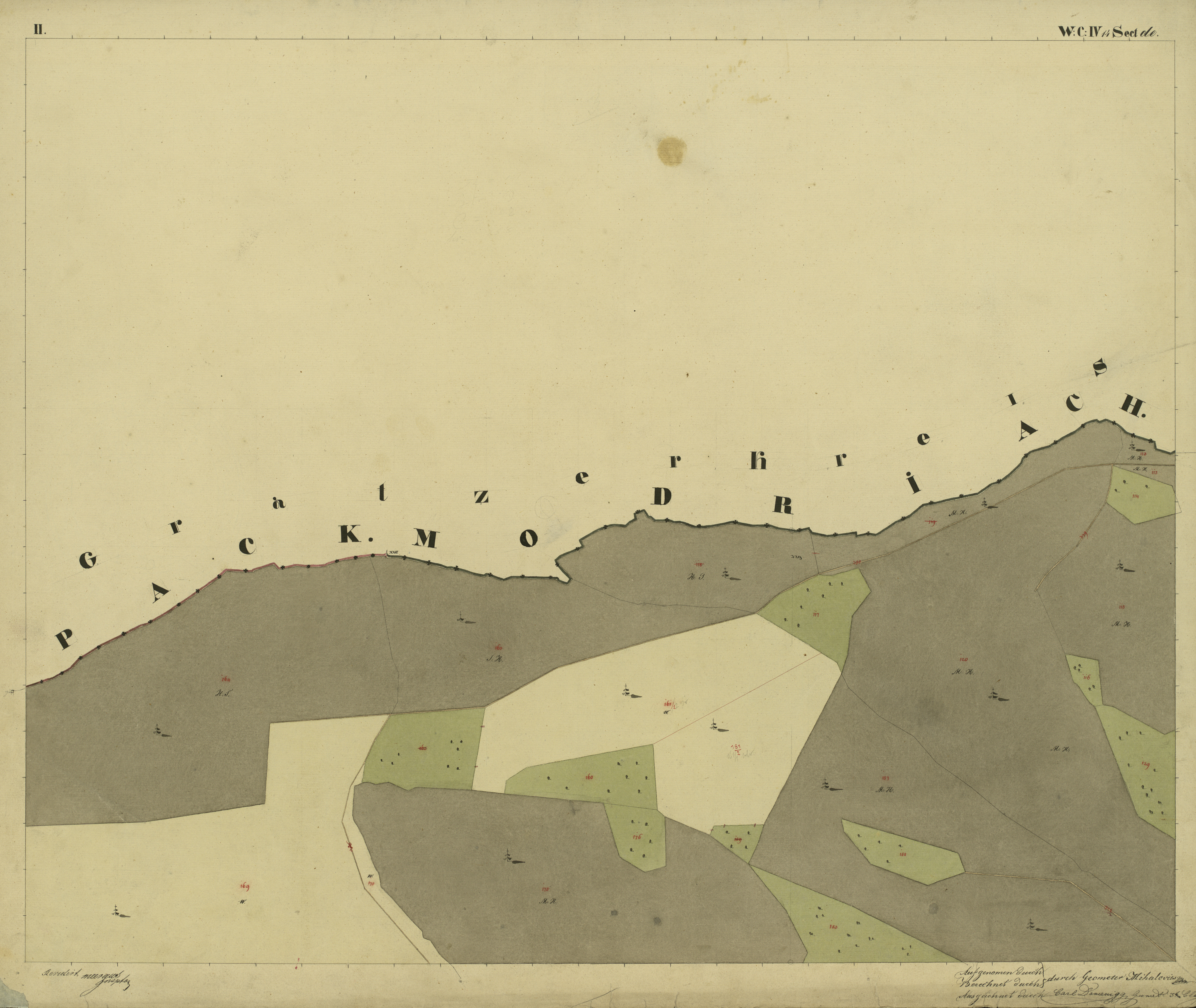 historische Vermessungskarte: österreichischer Kataster, Gemeinde Kloster. 1825. Blatt II Gebiet Mittelteil der Freiländeralm